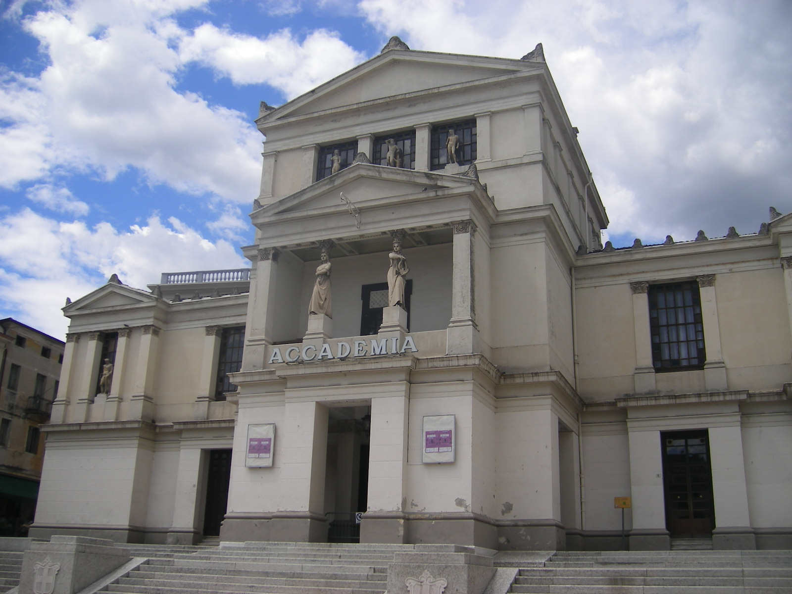 Conegliano, Teatro Accademia (XIX secolo)